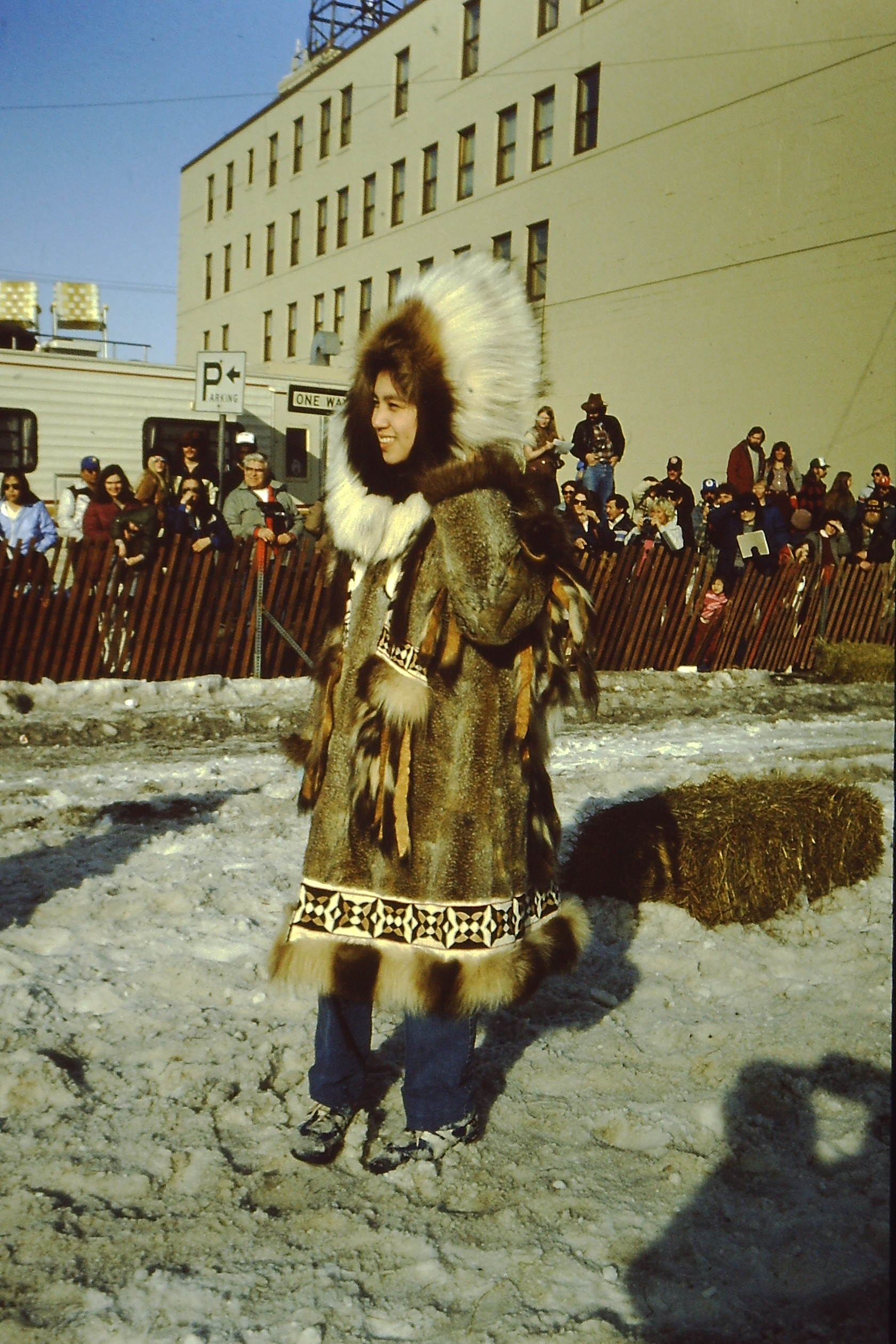 Fur market in Fairbanks. Inuitfrau auf dem Pelzmarkt. Parka aus arktischem Zieselfell mit Fuchsfell, Dachsfell und Skunksfell.